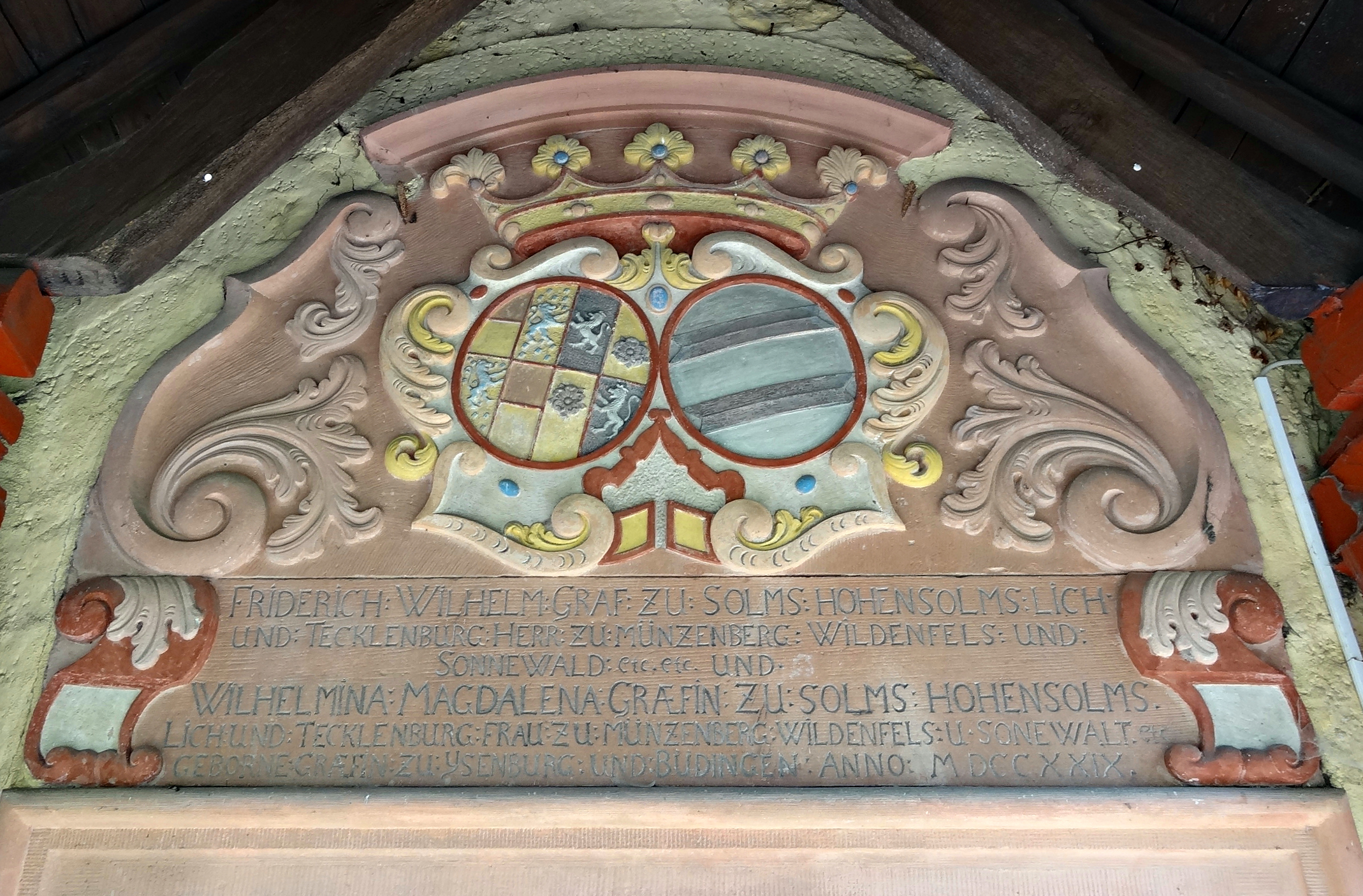 Evangelische Kirche Ober-Hörgern